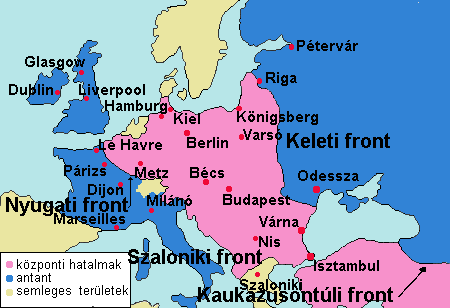 A háborús Európa térképe 1917 elején